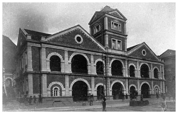 1897年香港中環街市